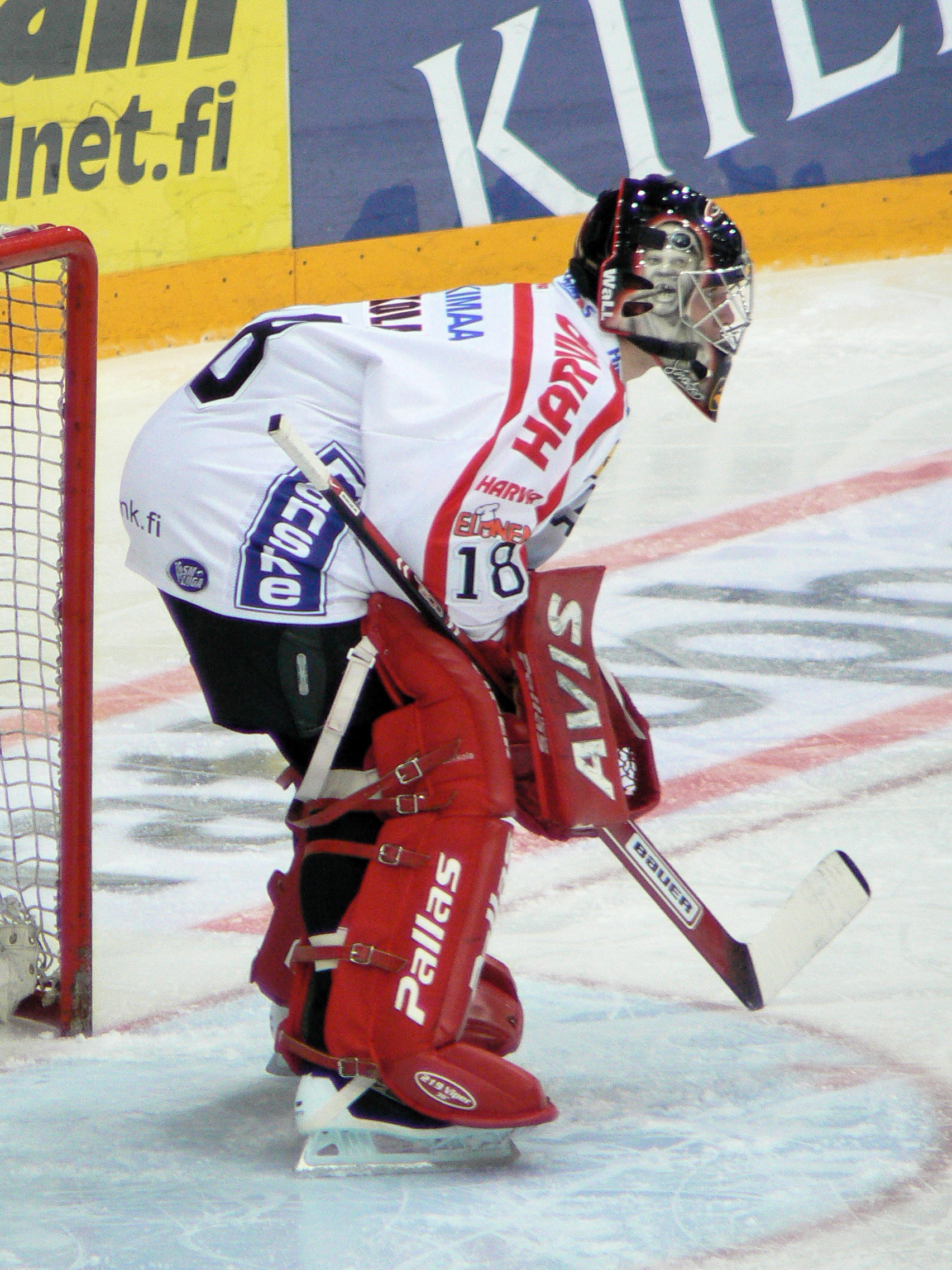 Finnish ice hockey goalkeeper Pekka Tuokkola of JYP Jyväskylä in October 2007.